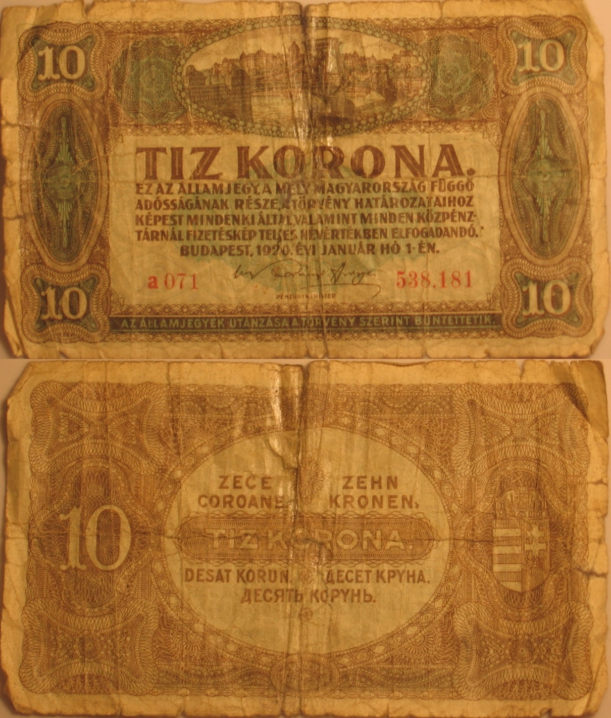 Hungarian 10 kronen, 1920